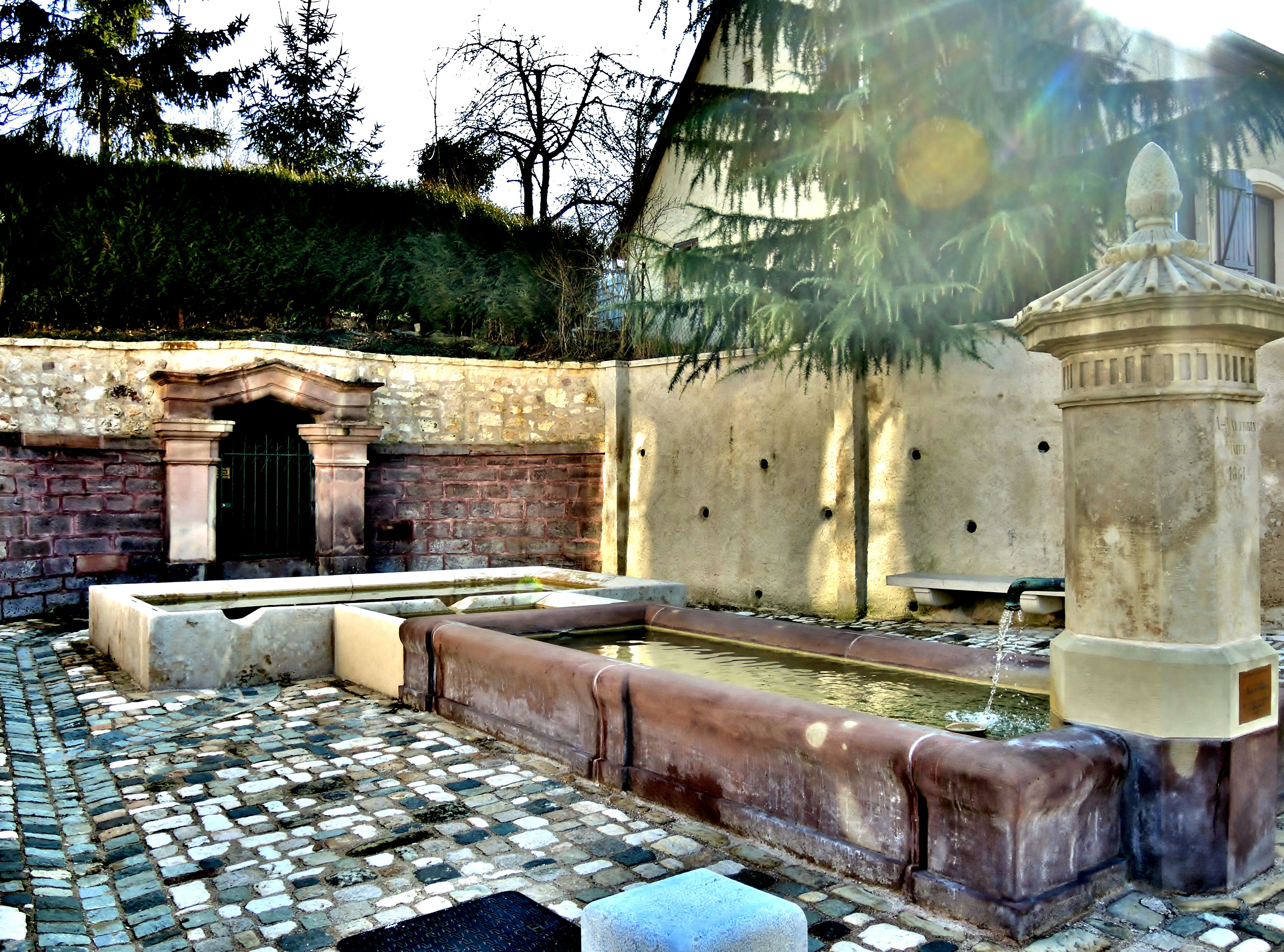 Fontaine Vautherin.